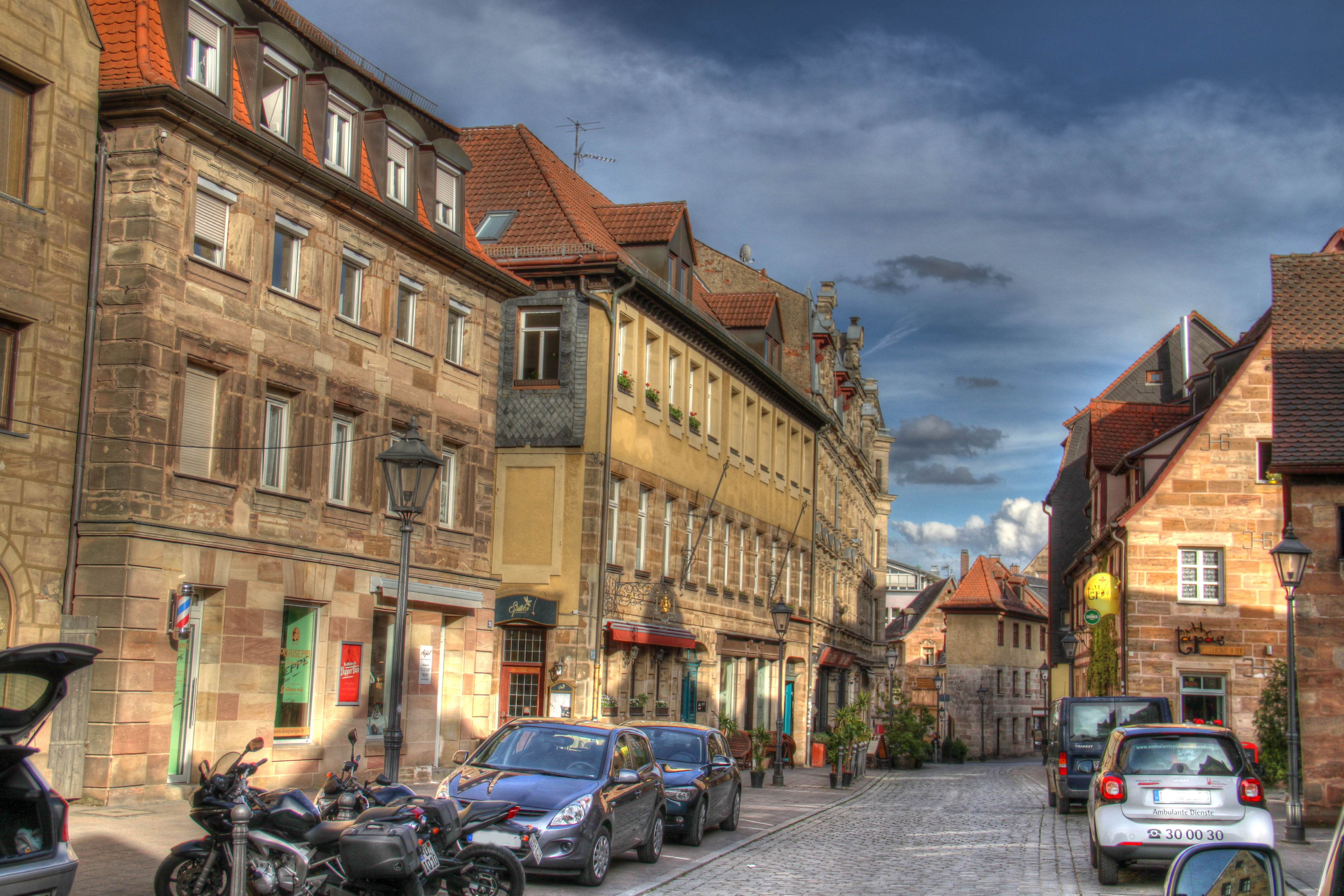 Gsutavstraße in Fürth, von links 16, 14, 12 rechts Tei von 15.